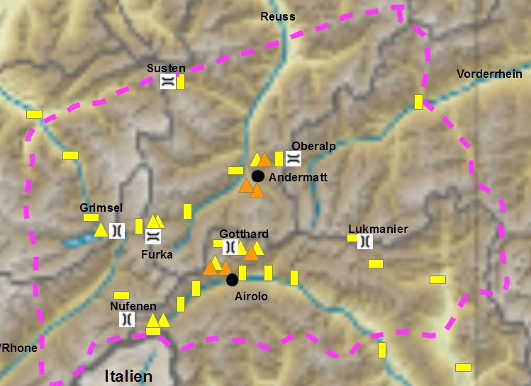 Karte des Festungsraumes St. Gotthard, Schweiz